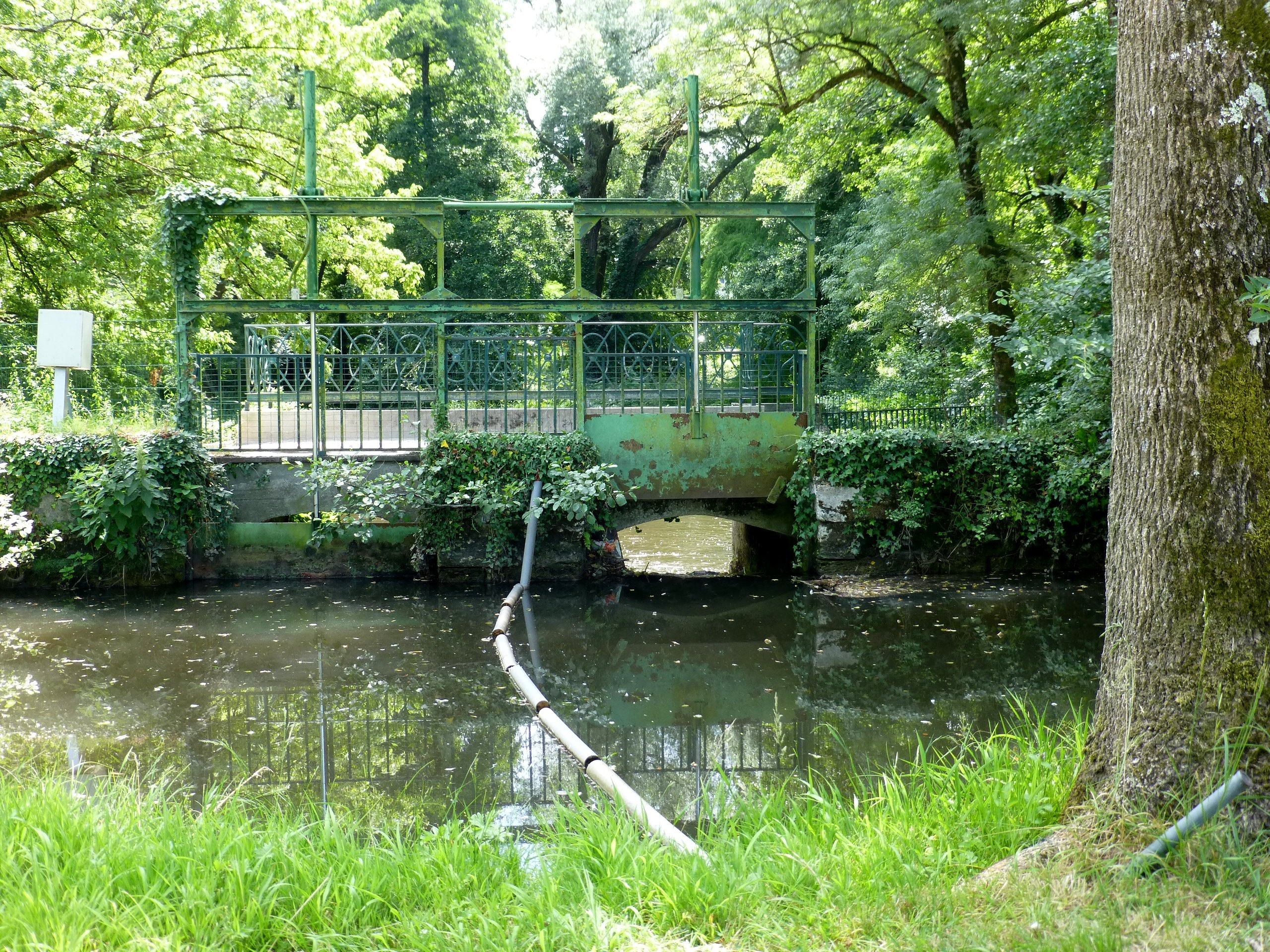 Gradignan, Parc du Moulineau ː Vannes en amont du moulin.